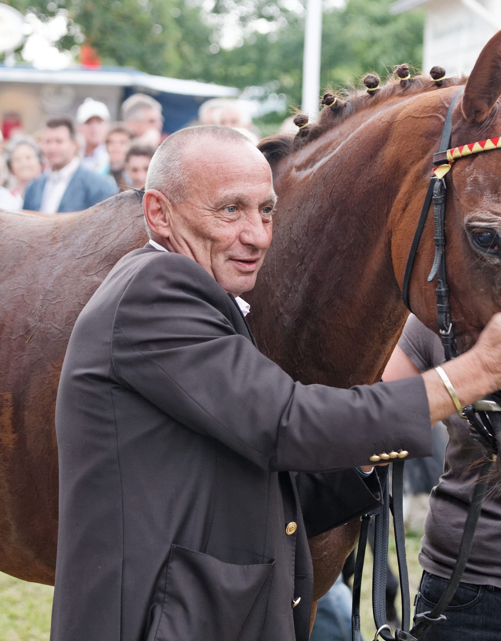 Uwe Stoltefuß mit der Stute Jallah im Abstattelring von Bad Harzburg nach seinem 2000. Karrieresieg